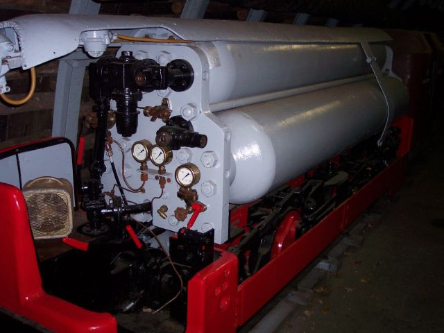 Pressluftlokomotive einer Grubenbahn.